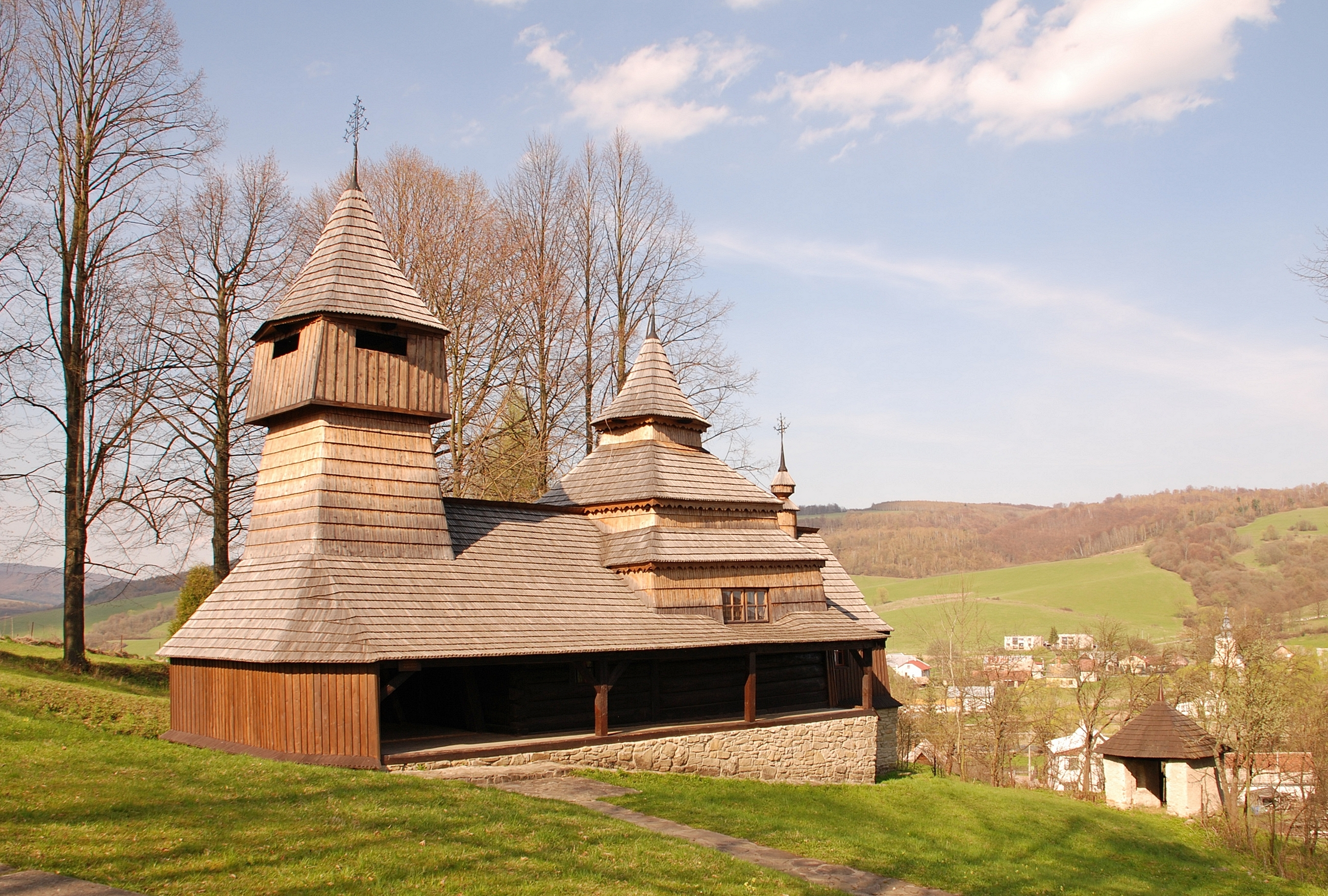 wieś Lukov (powiat Bardejów)